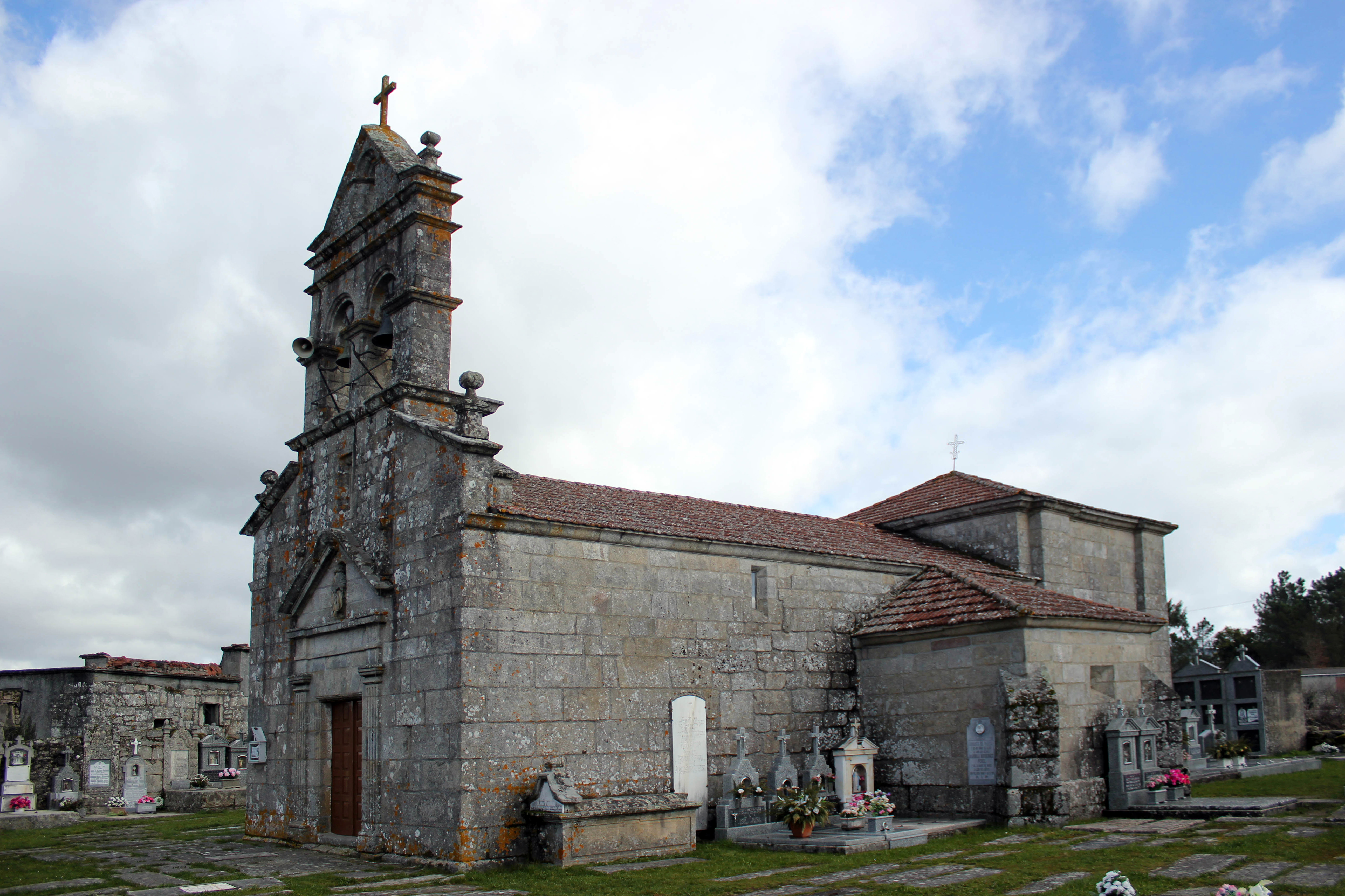 Igrexa de San Mamede da Canda, no concello da Piñor.